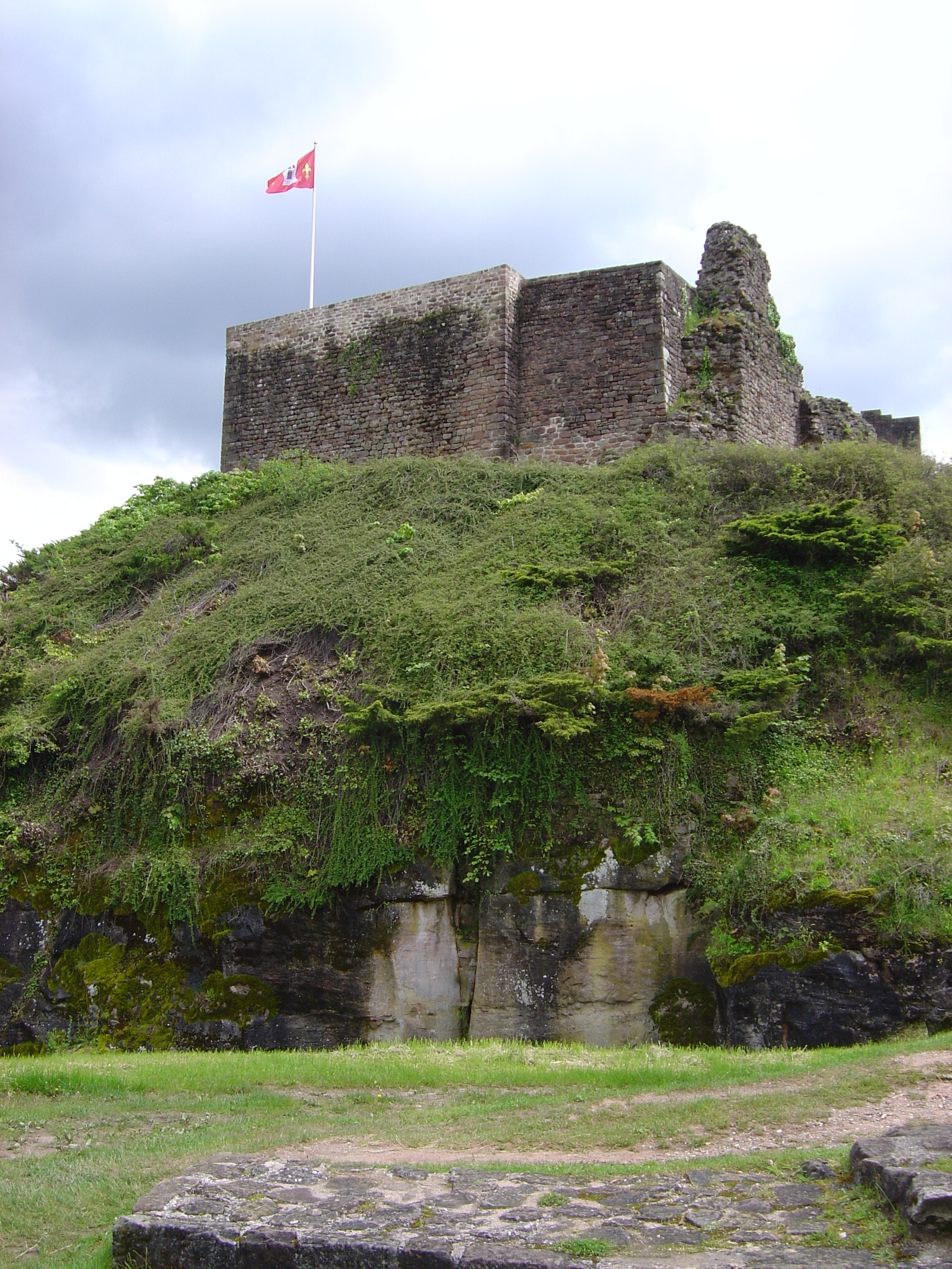 Ruines du château d’Épinal.